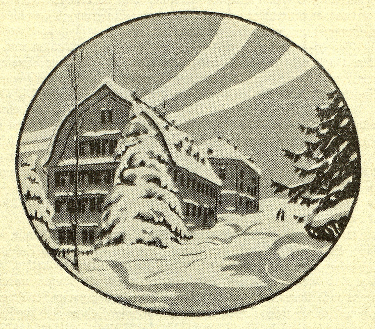 Illustration aus der KVT-Mitteilung Nr. 1. Kantonsschulareal im Winter; Konvikt und "Altes Schulhaus"